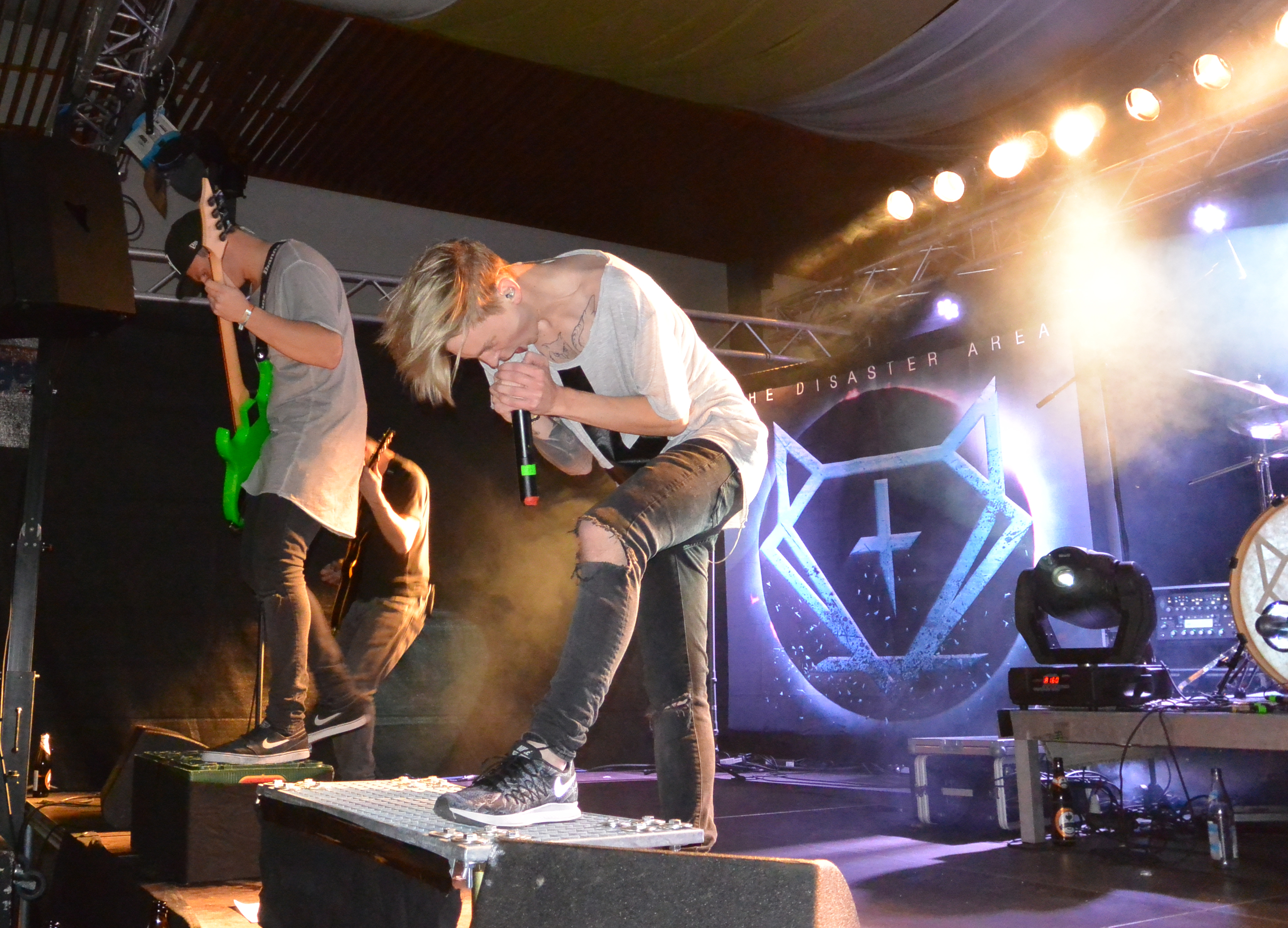 THE DISASTER AREA live im Jahr 2016